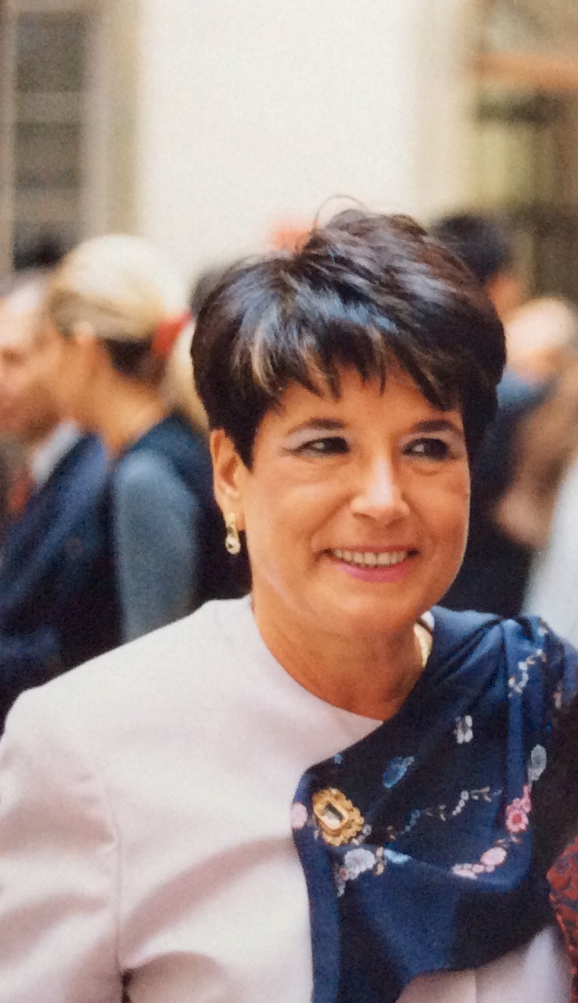 Foto di Giusi Verbaro